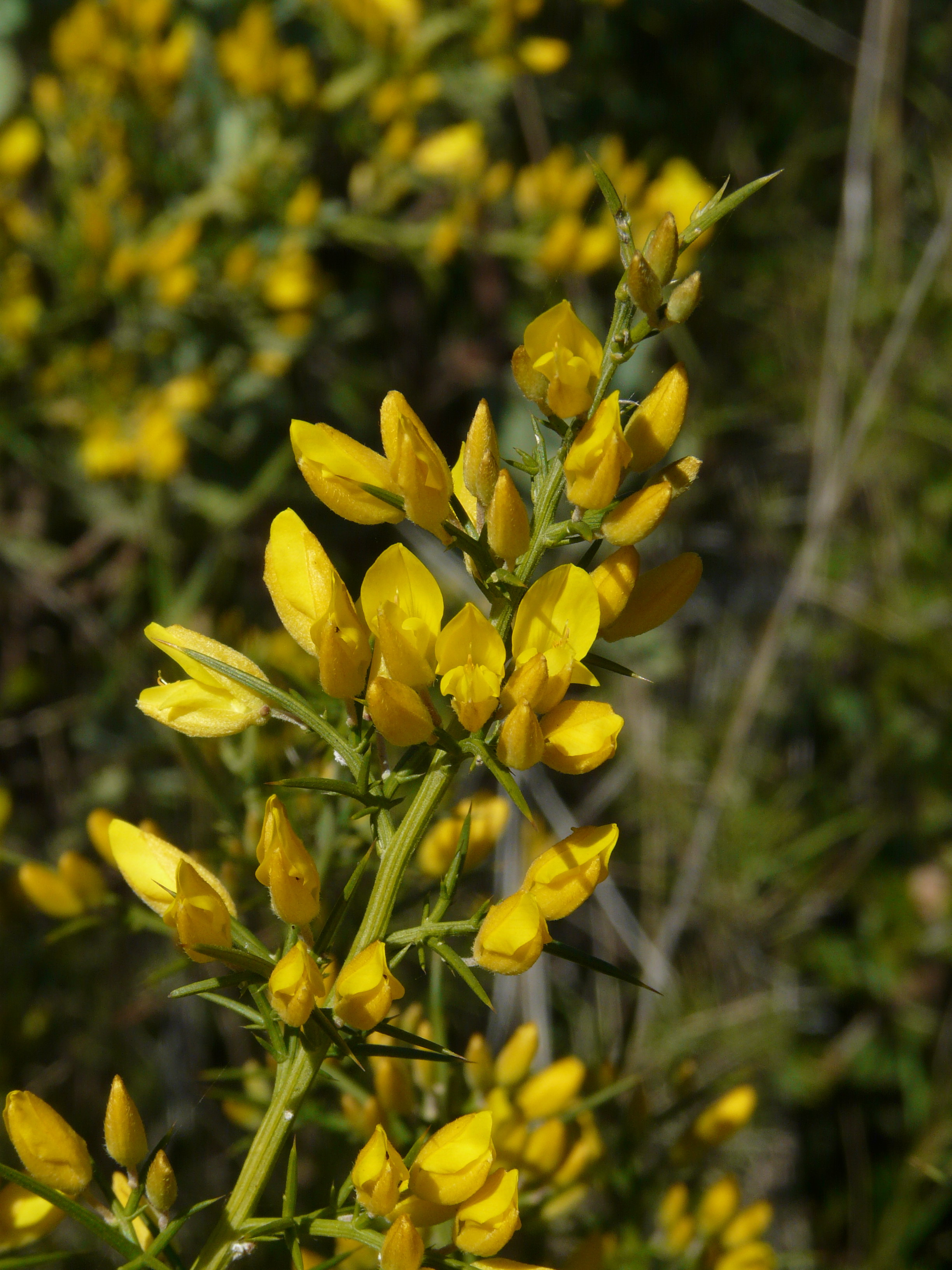 Gatosa (Ulex parviflorus) florida a la serra de Collserola, a l'extrem superior de la vall de Sant Just a sota el coll de Can Cuiàs.